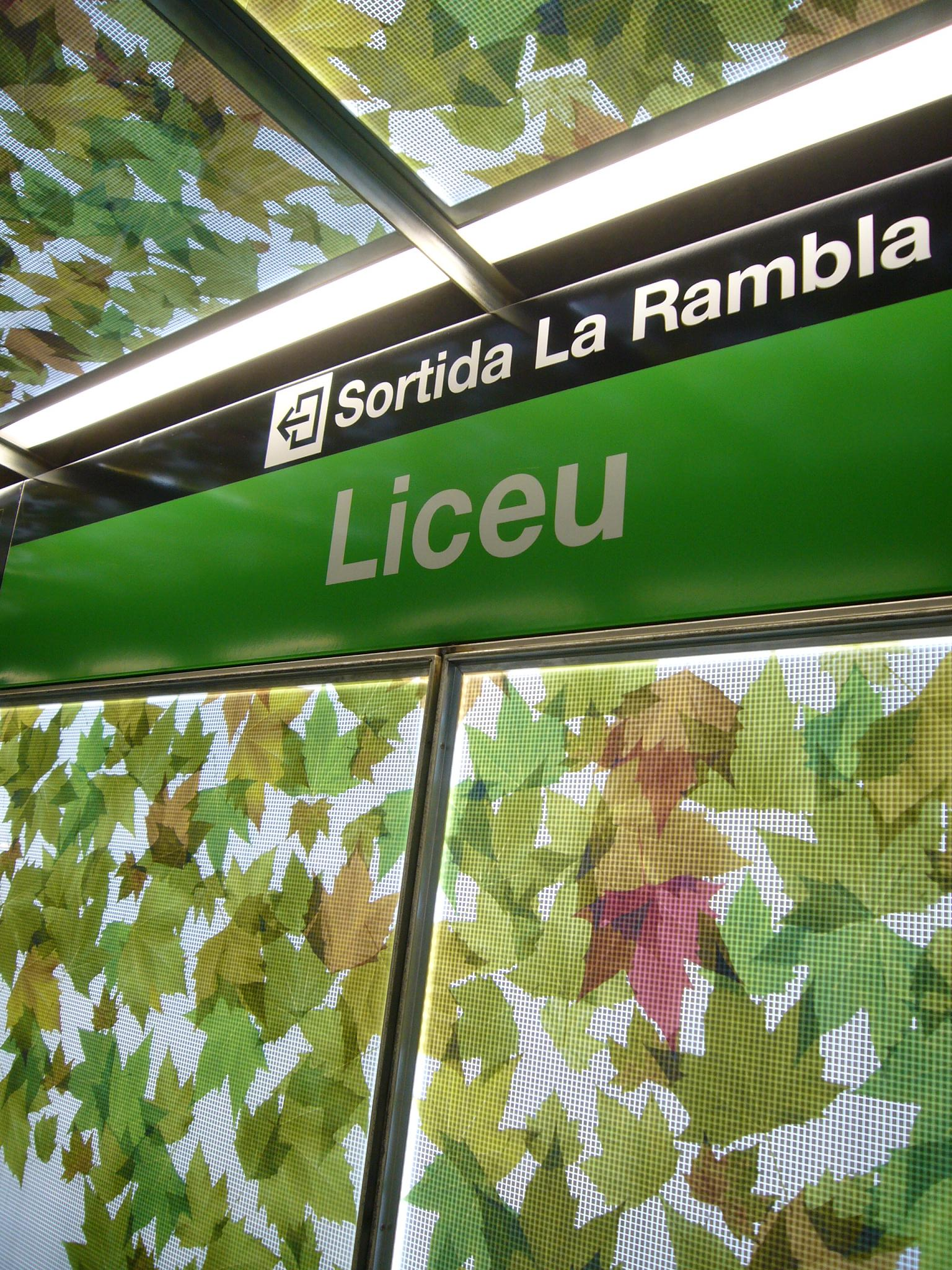 fotografia de la nova decoració de l'estació de Liceu de la línia 3 del Metro de Barcelona.